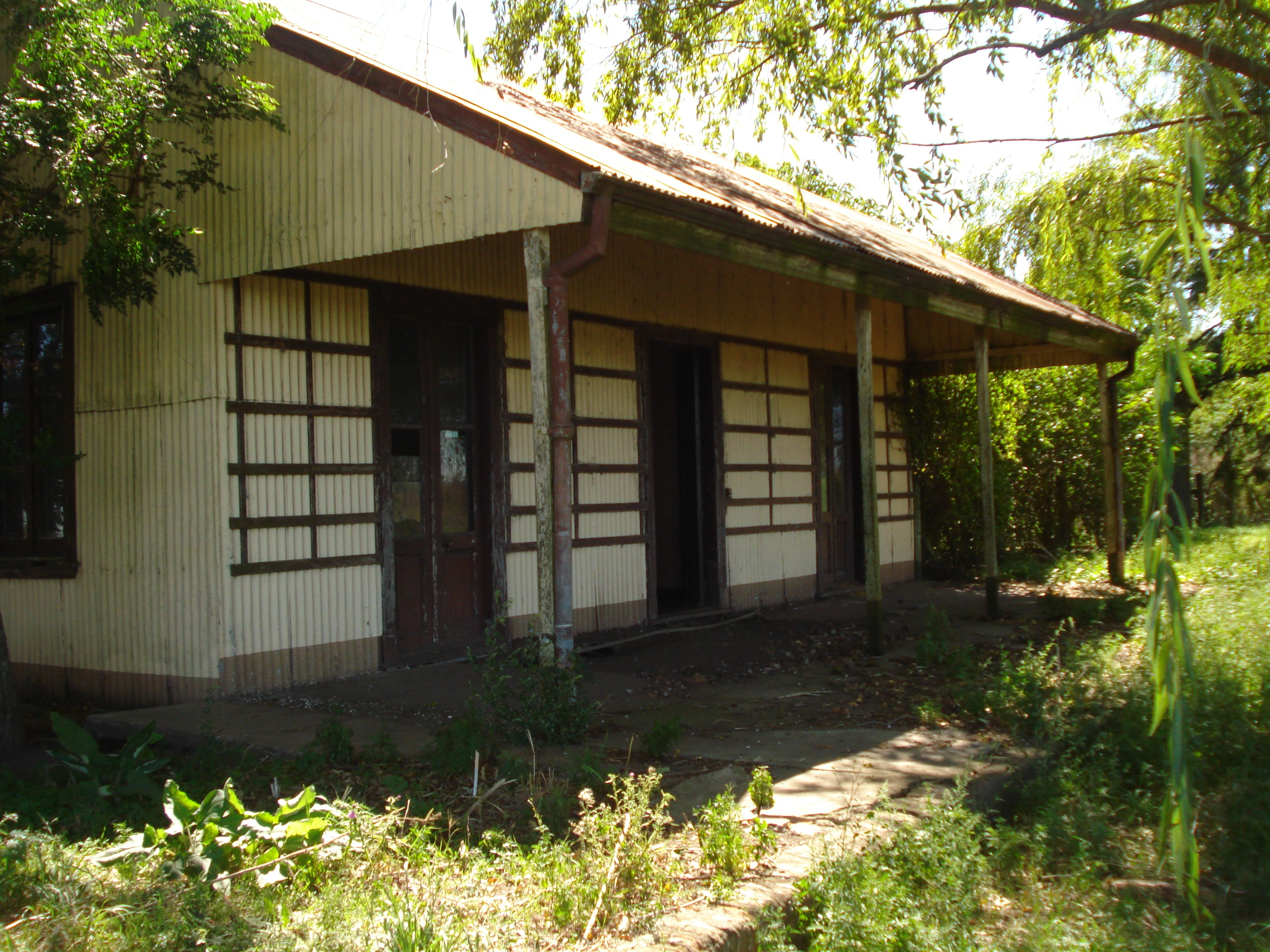 Estacion Ingeniero Williams